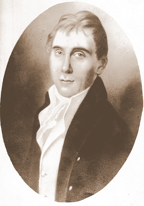 Portrait des Oberamtmanns Karl Friedrich Wilhelm Lüdke aus Alt-Landsberg